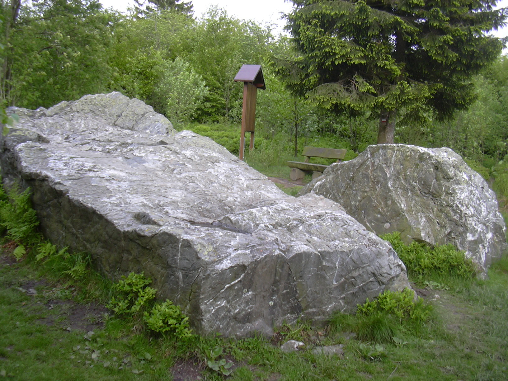 "Emperor Charles' Bed", Rock near Monschau-Mützenich, frontier Germany/Belgium, Eifel/Hautes Fagnes